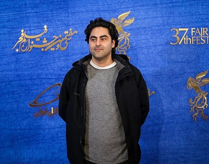 مسعود بخشی در سی و هفتمین دوره جشنواره فیلم فجر